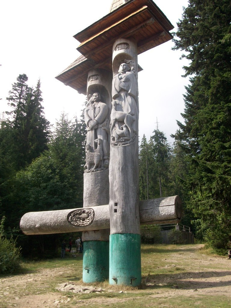 НПП** «Синевир», Міжгірський, Хустський райони